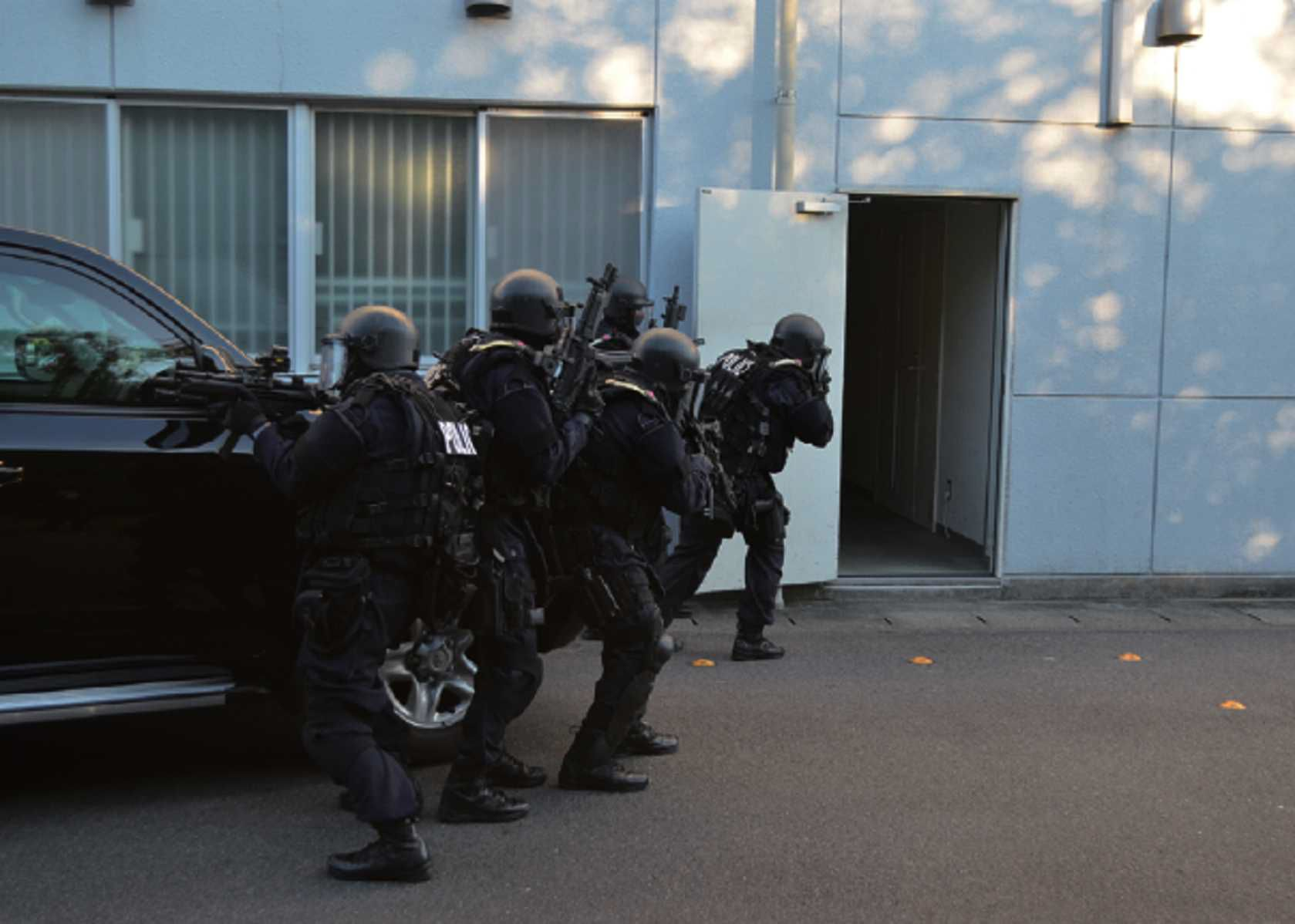 特殊部隊（ＳＡＴ）の訓練